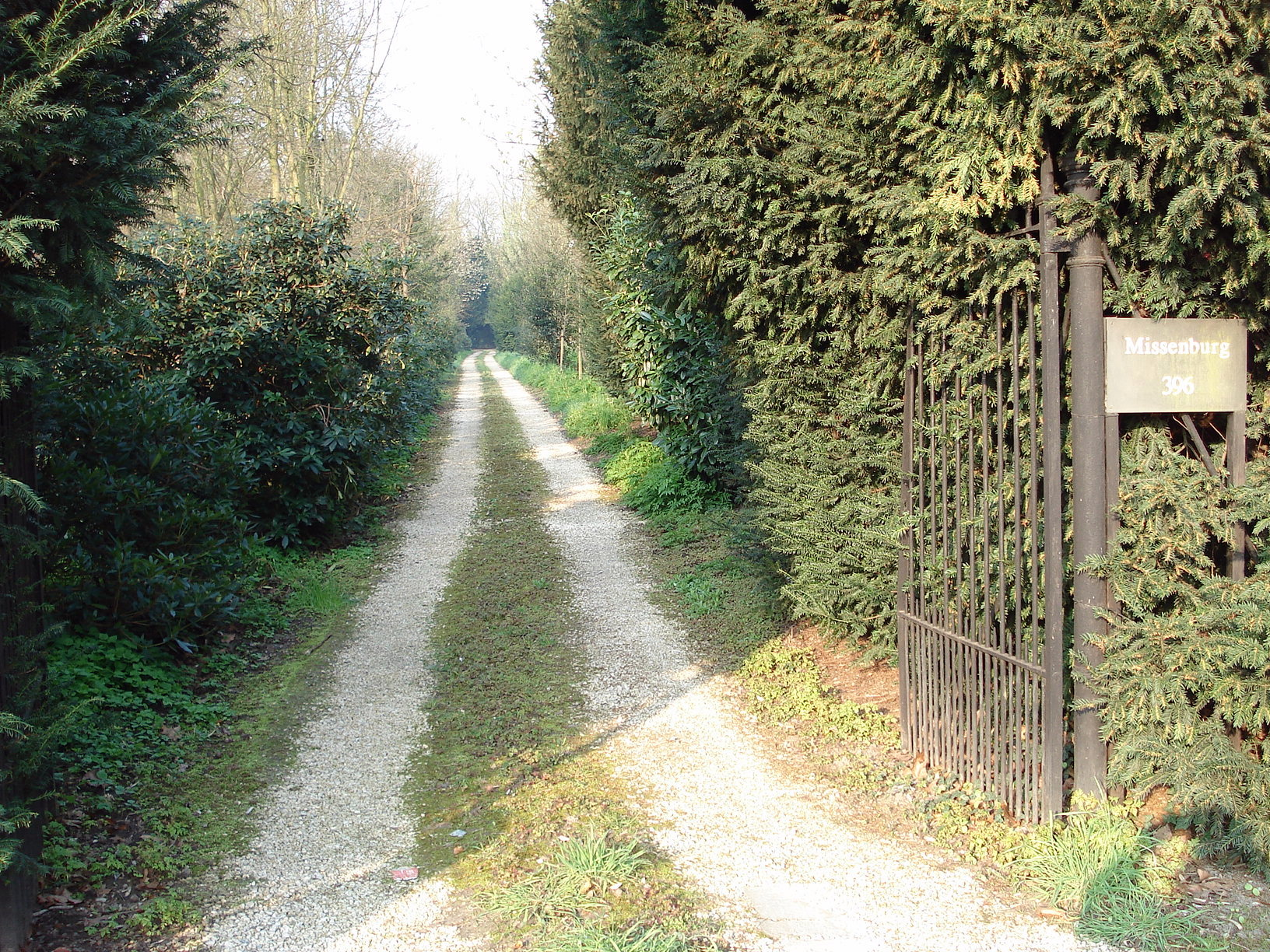 Hof Mussenborg te Edegem, oprijlaan Mechelsesteenweg.